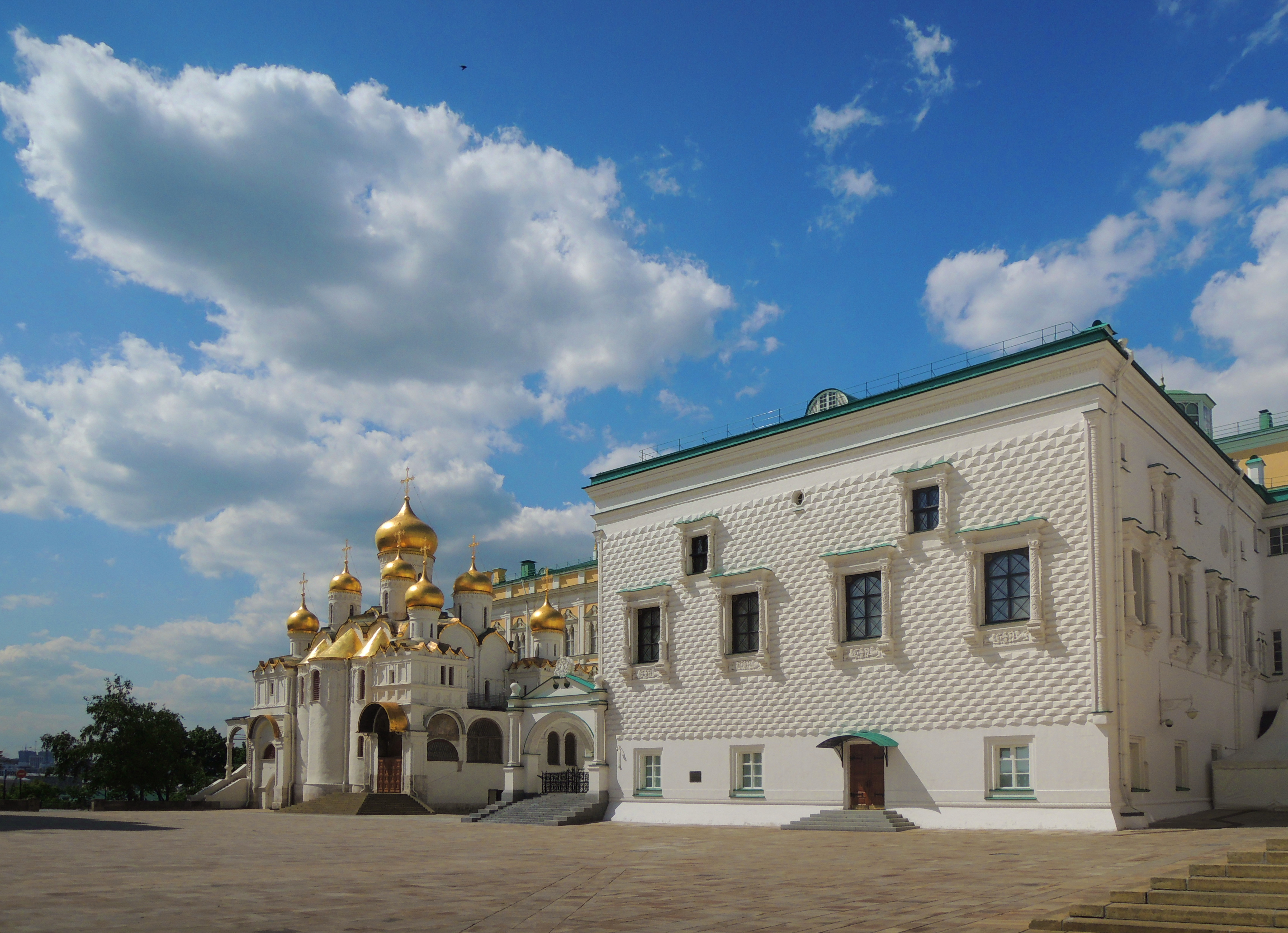 Архангельский собор